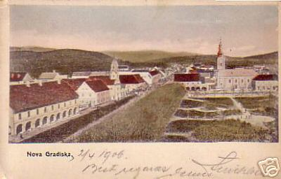 Nova Gradiska 1906 photograph